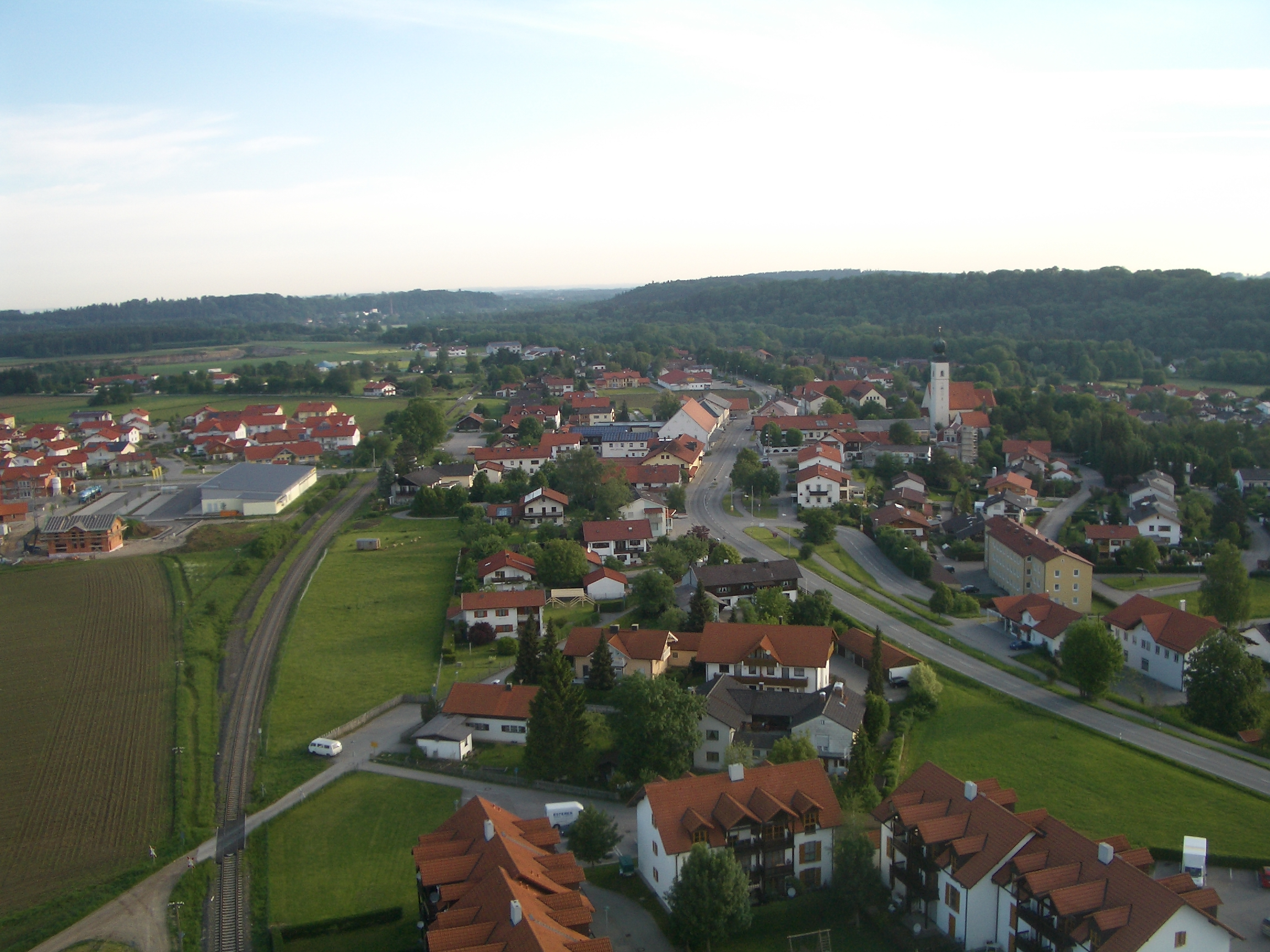 Blick auf Tacherting (aus Richtung Süd)